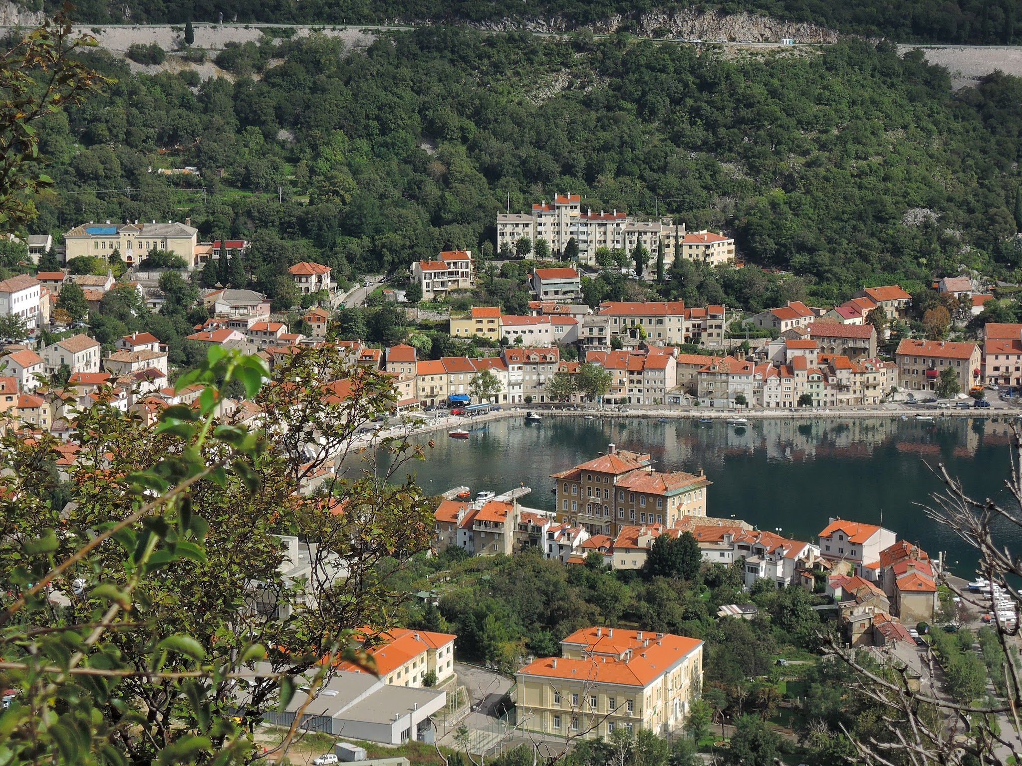 Bakar, Croatia